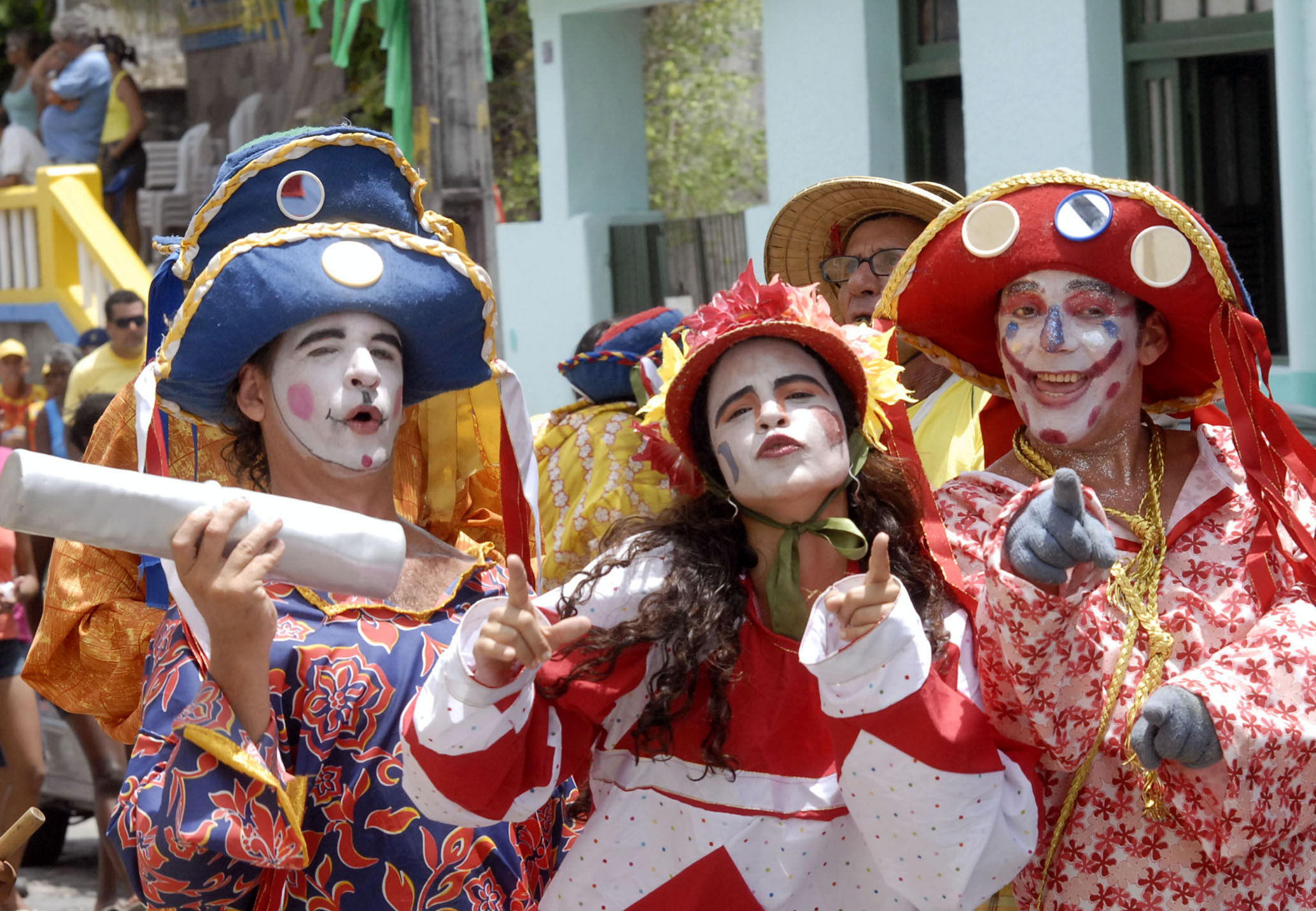 Bloco de rua, Carnaval do Olinda, Pernambuco, Brazil